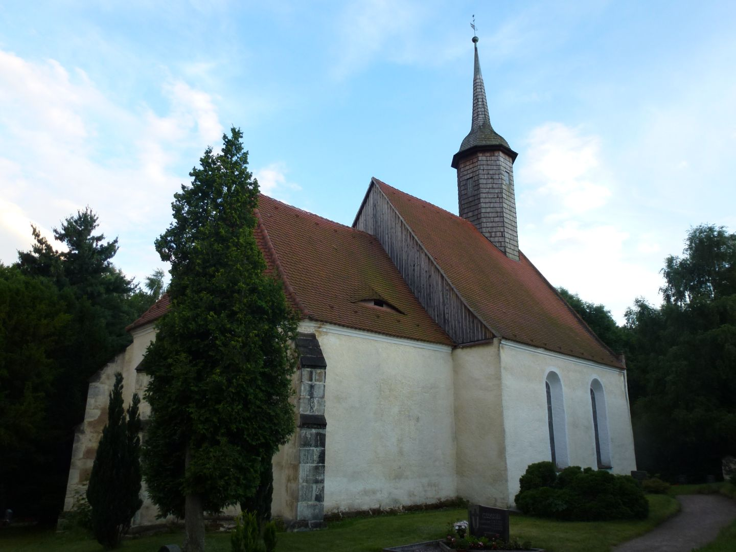 Kirche in Lausa